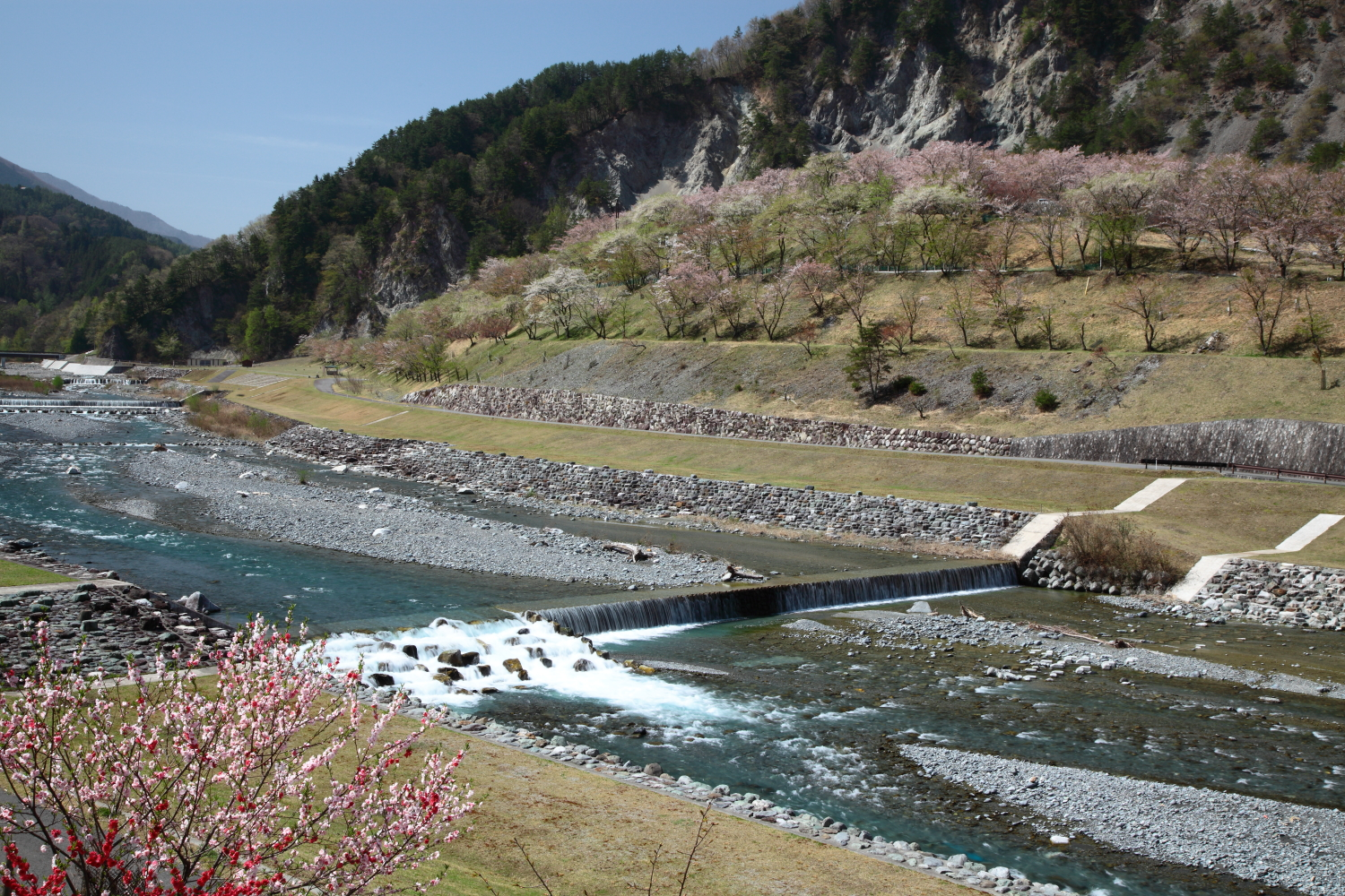 大西公園と小渋川（下伊那郡大鹿村、2012年）